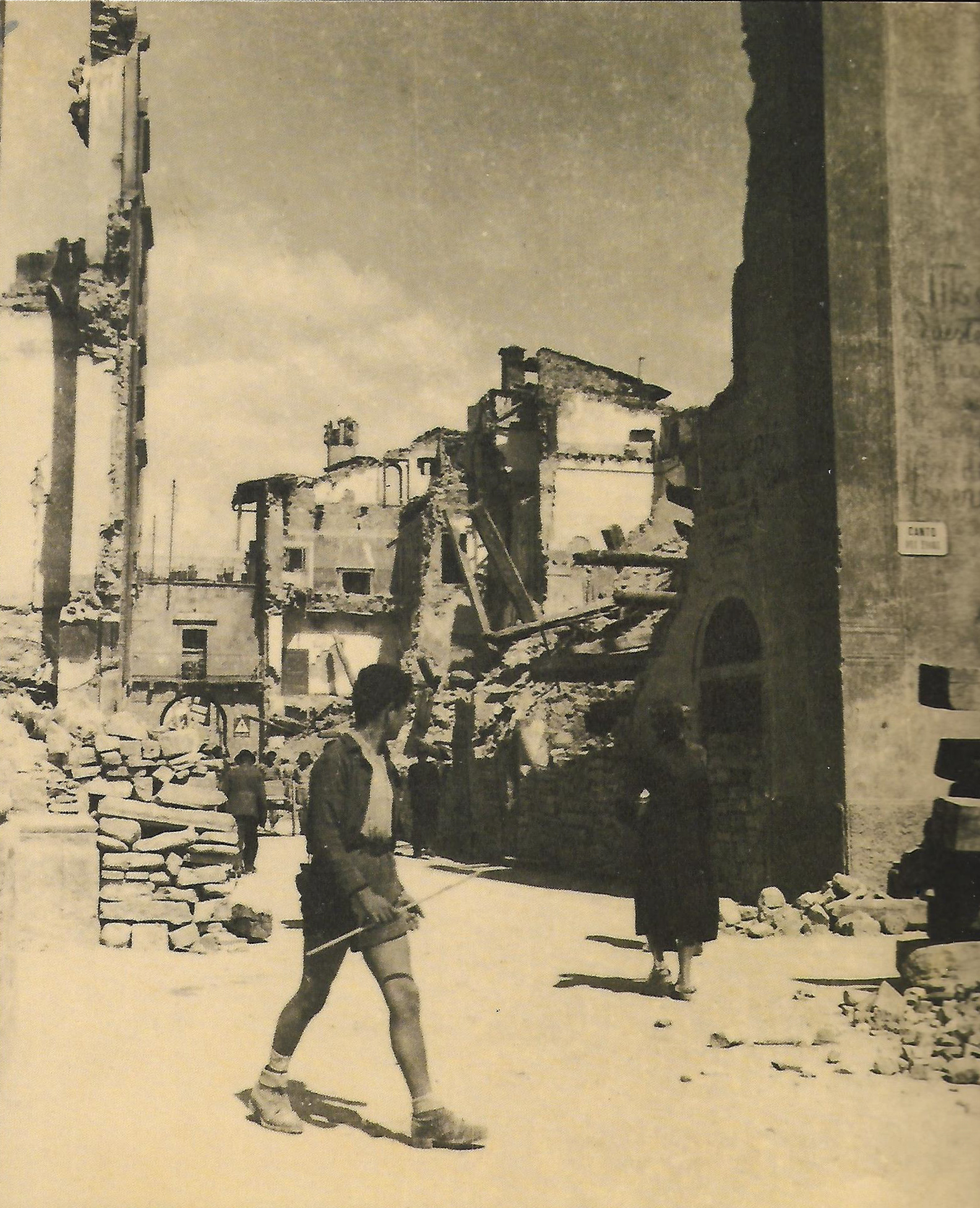 Il centro storico di Pieve Santo Stefano ridotto in macerie dall'esercito tedesco nella seconda guerra mondiale. Foto realizzata nel 1944 da Lidio Livi (Archivio Fotografico Livi)